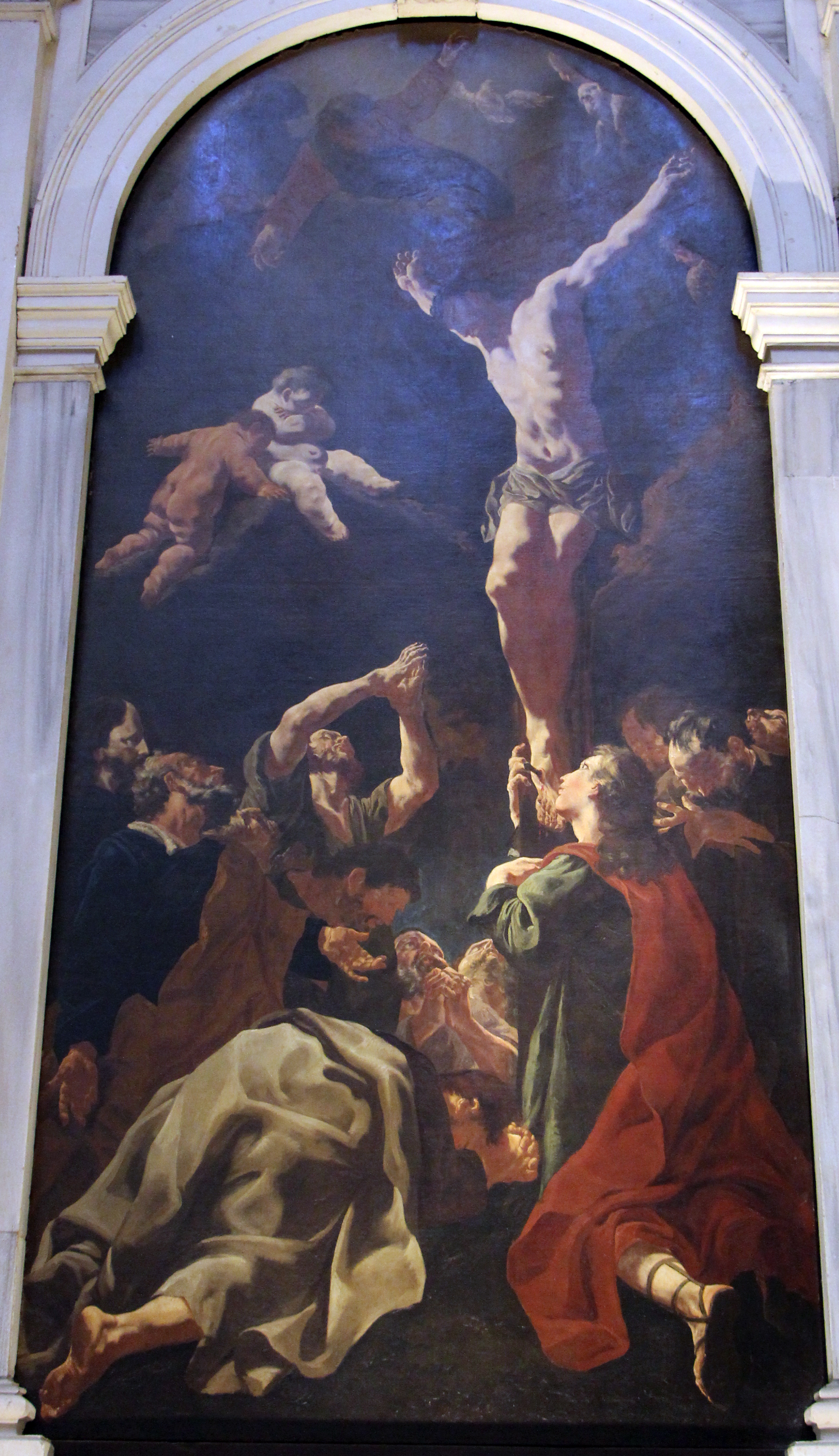 Venezia